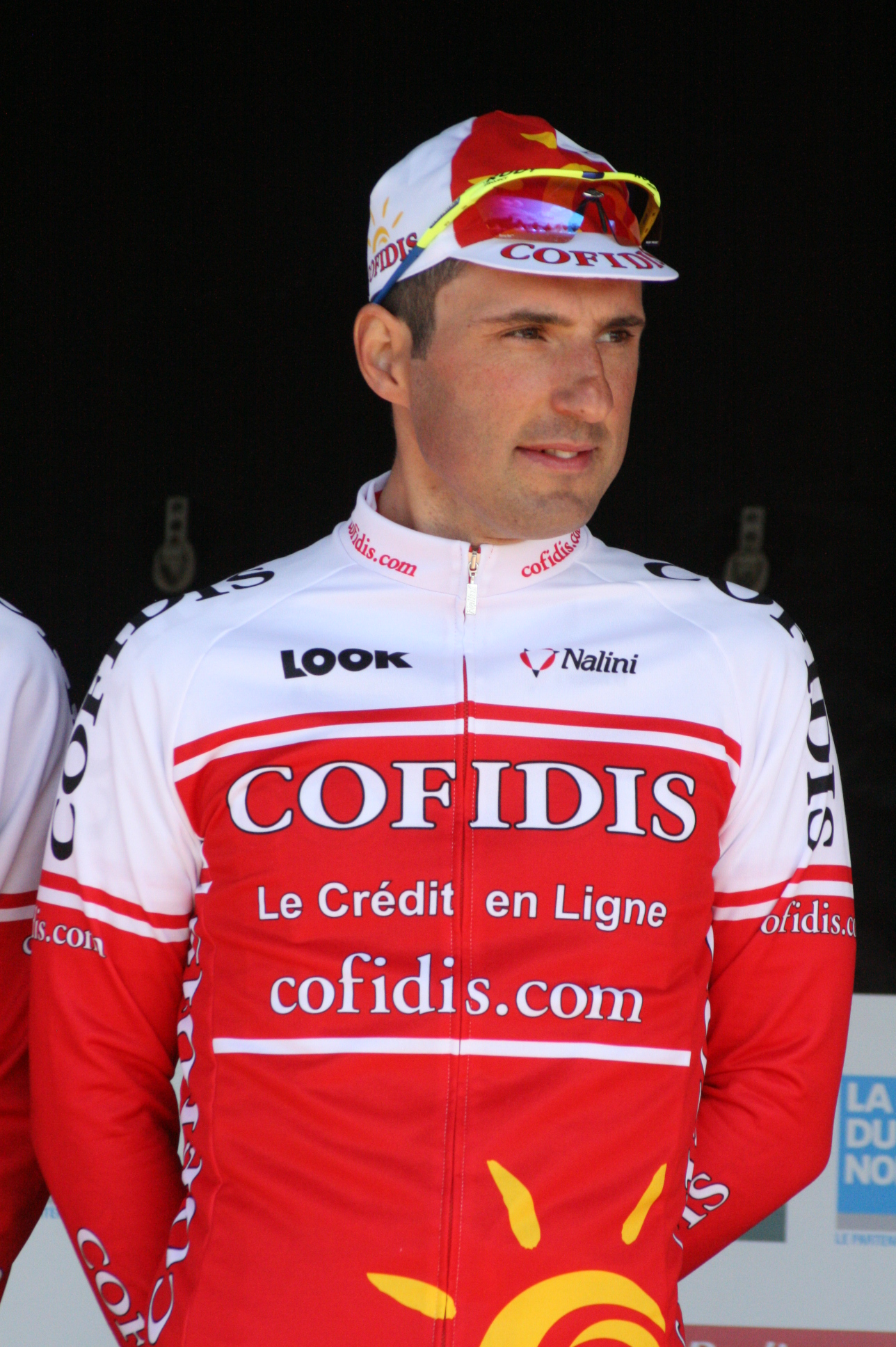 Arnaud Labbe lors de la présentation des équipes des 4 jours de Dunkerque 2010